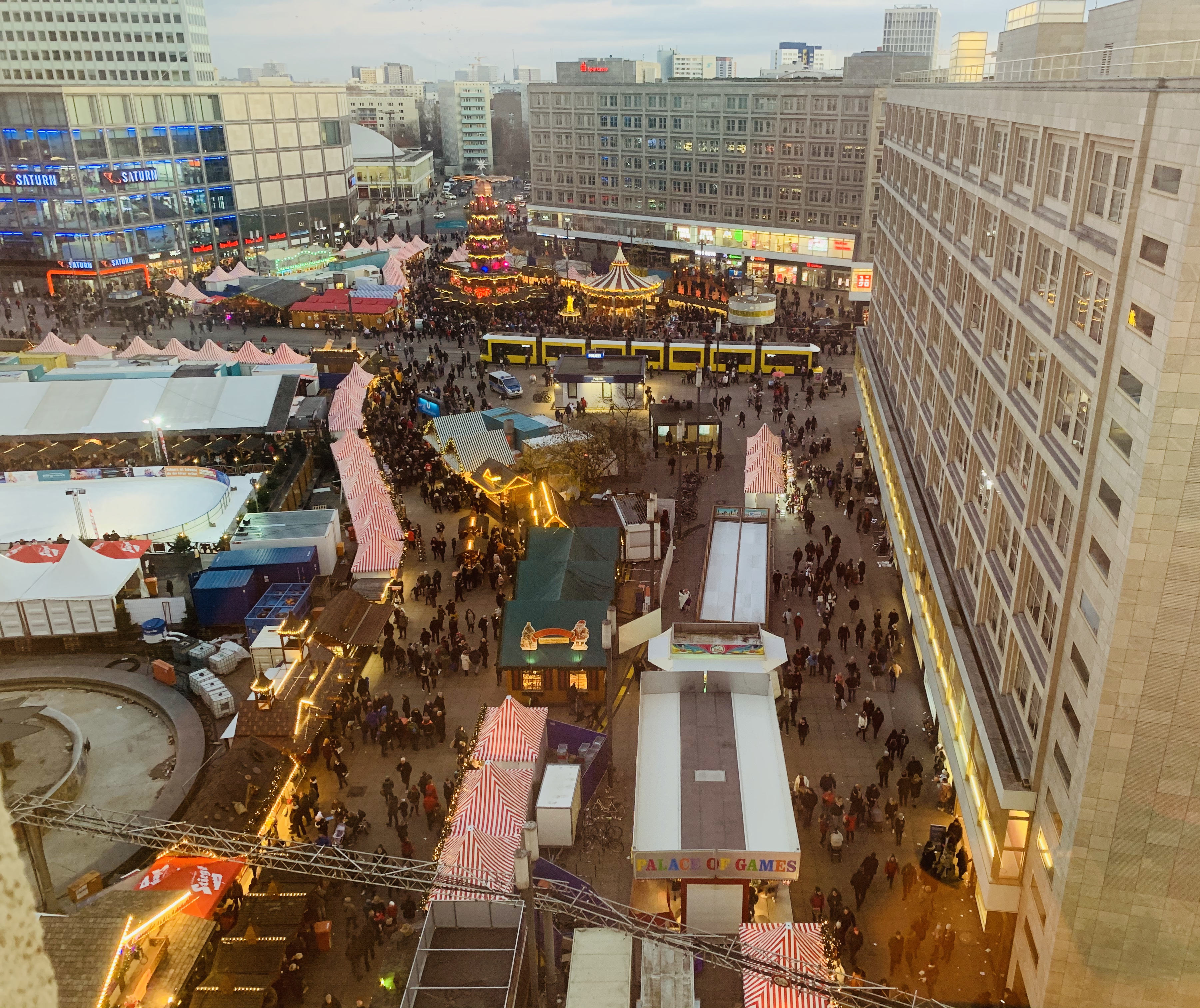 Alexanderplatz Weihnachtsmarkt 2019